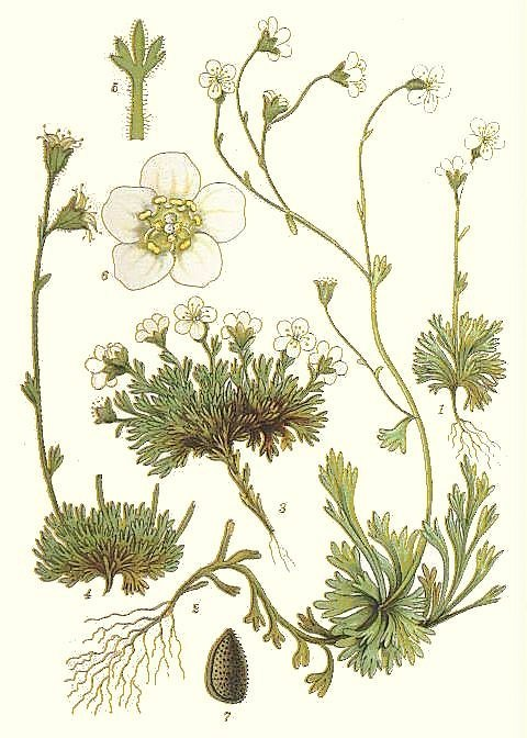 Saxifraga cespitosa L., syn. Saxifraga groenlandica L. Original Description Tuvbräcka, Saxifraga groenlandica L.